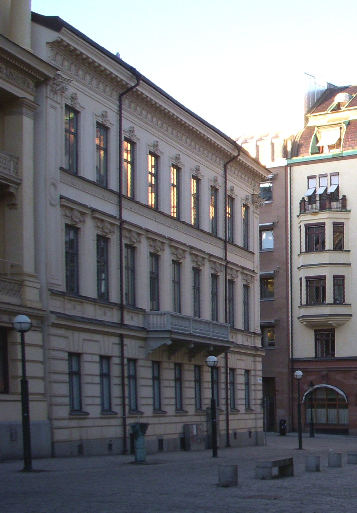 Stora Sällskapet på Blasieholmstorg, Stockholm